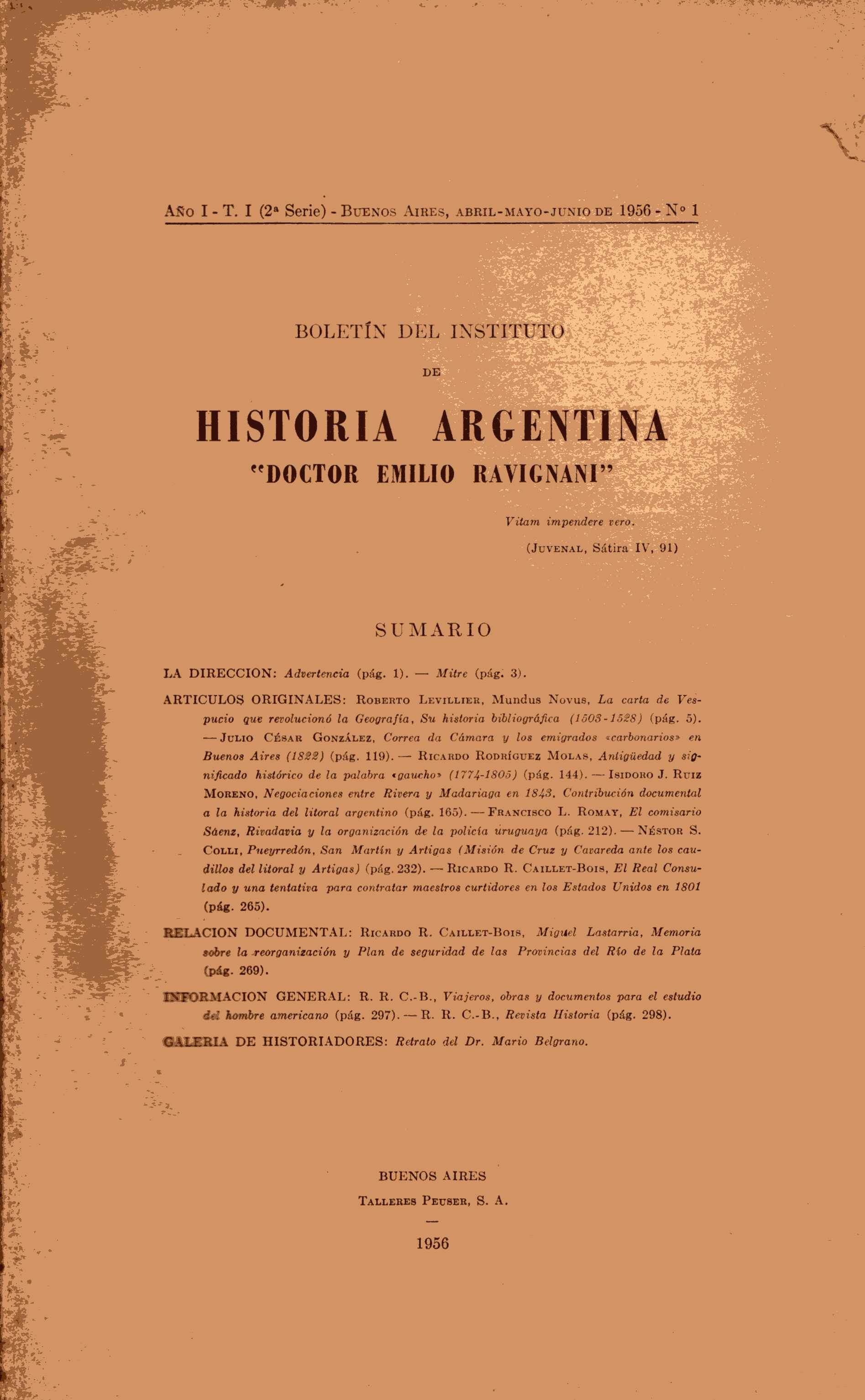 Portada del Boletín del Instituto de Historia Argentina "Doctor Emilio Ravignani", Segunda Serie, Vol. I, nº 1, 1956